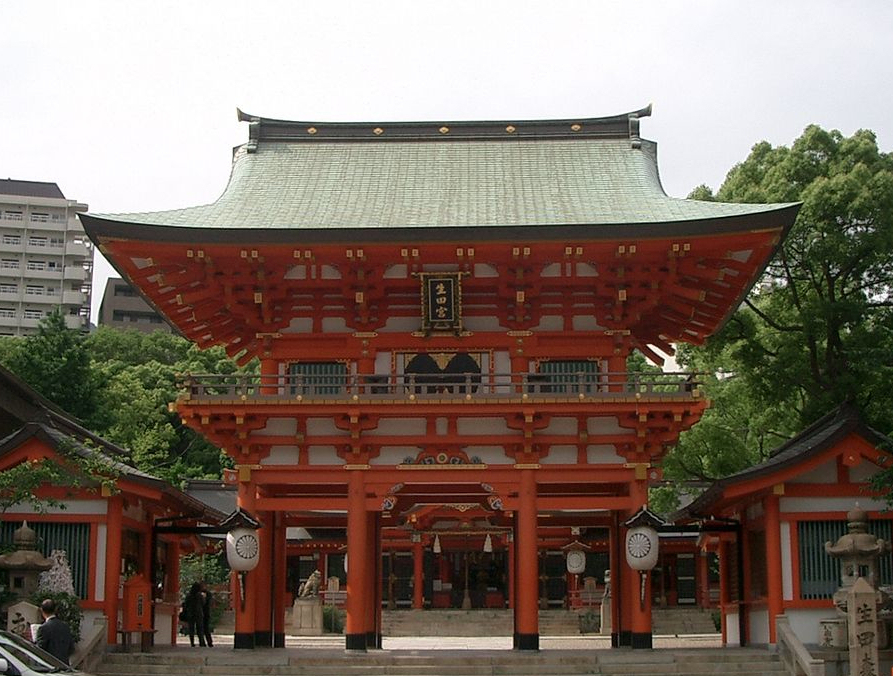 生田神社（Ikuta Shrine）)